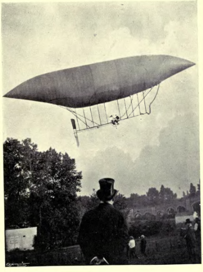 N 4. voa frente ao Professor Langley.